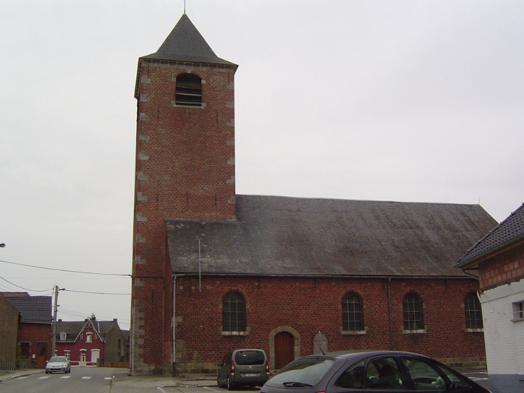 Église Saint-Martin de Huissignies, construite en 1791